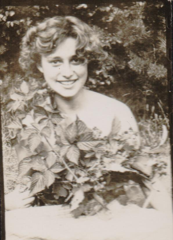 Wanda Ficowska